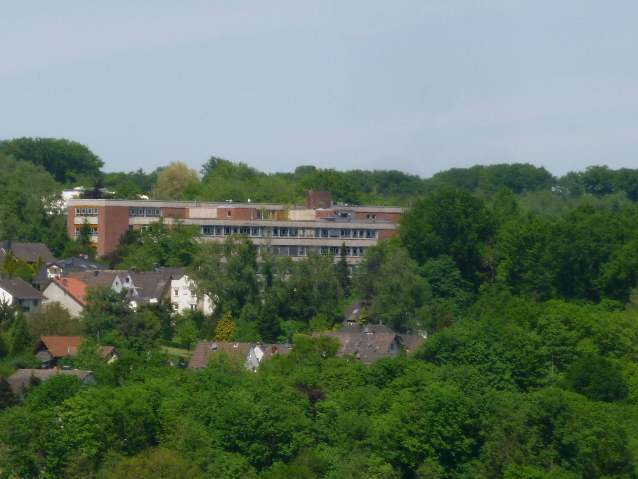 Blick auf die Freiherr-vom-Stein-Schule vom gegenüberliegenden Stadtteil Menzlingen, Mai 2015